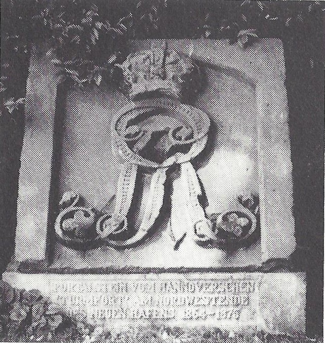 Portalstein des hannoverschen Turmforts in Bremerhaven.